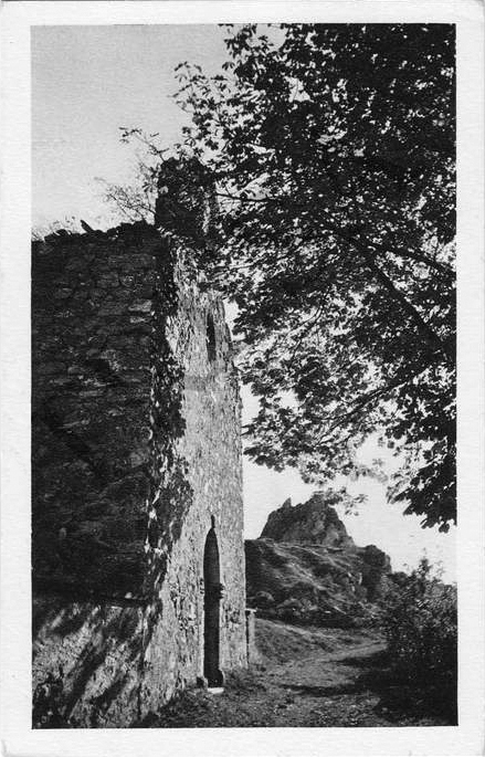 Cognet, Isère, France. La vieille chapelle, environ de La Mure.